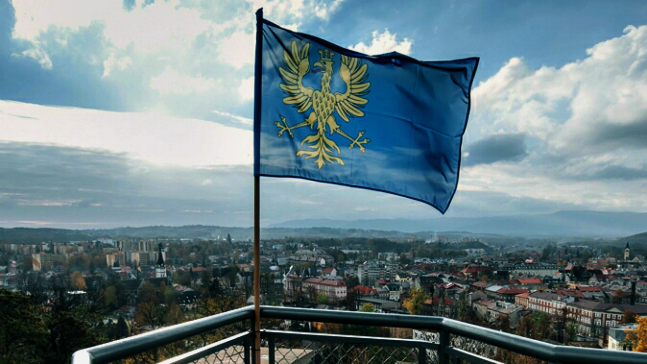 Flaga Księstwa Cieszyńskiego na Wieży Piastowskiej w Cieszynie, listopad 2016